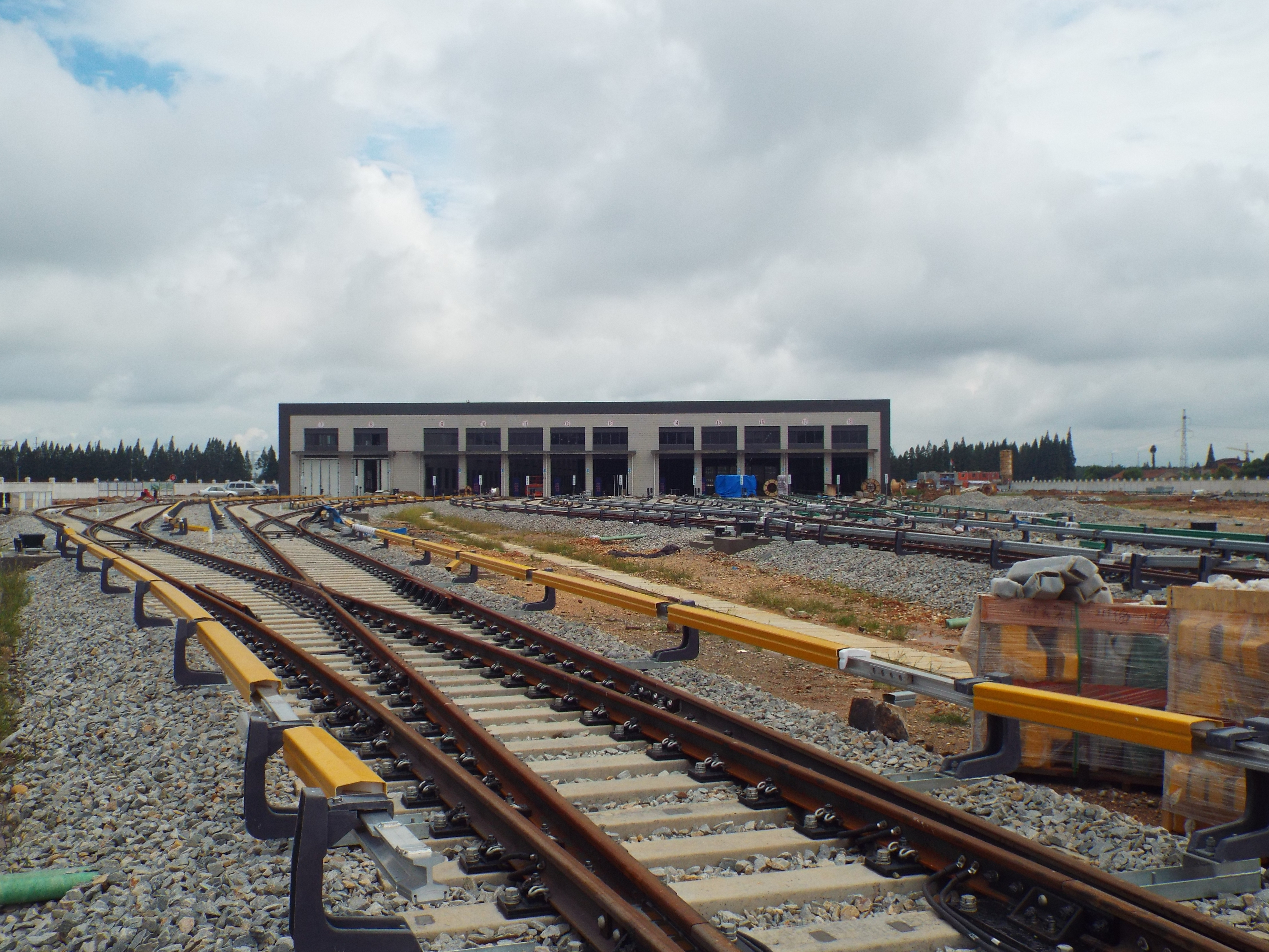 Daoshuihe Depot